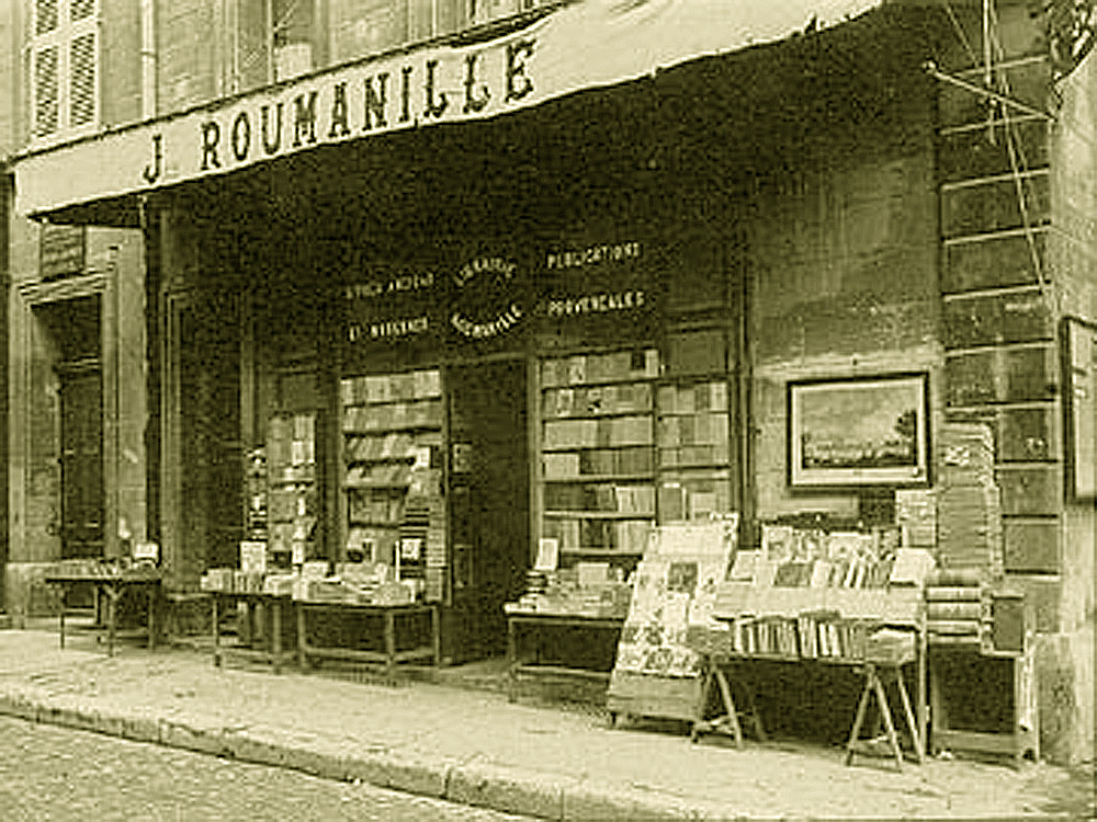 Librairie Roumanille à Avignon (Vaucluse, France).